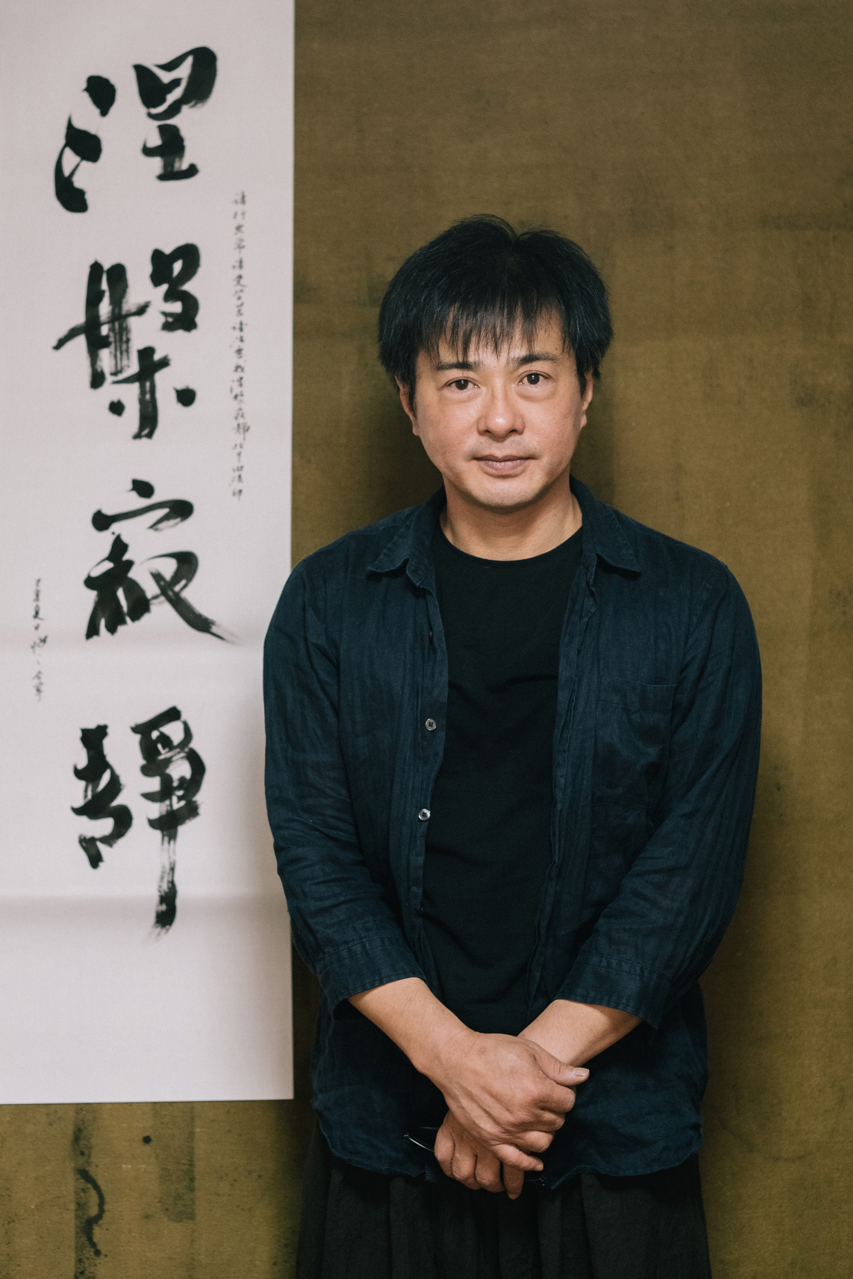 許悔之與他的作品「涅槃寂靜」，攝於墨觀堂，2019年7月